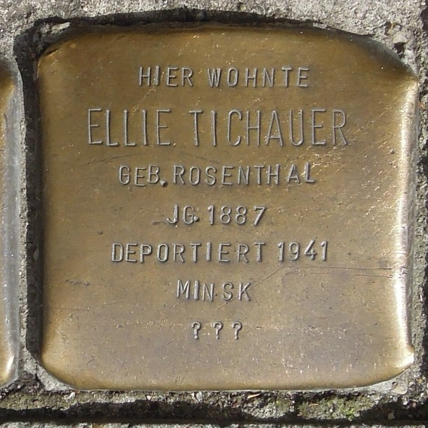 Stolperstein HH-Bergedorf Alte Hansestraße 61